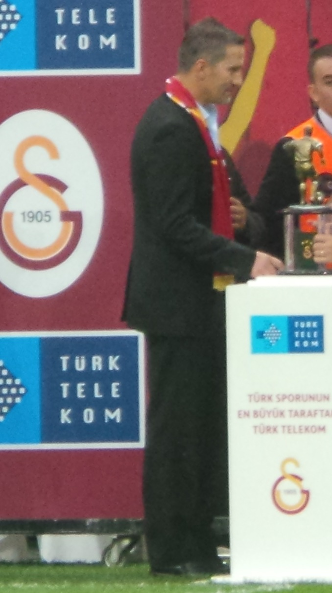 Ergün Penbe Rizespor maç öncesi